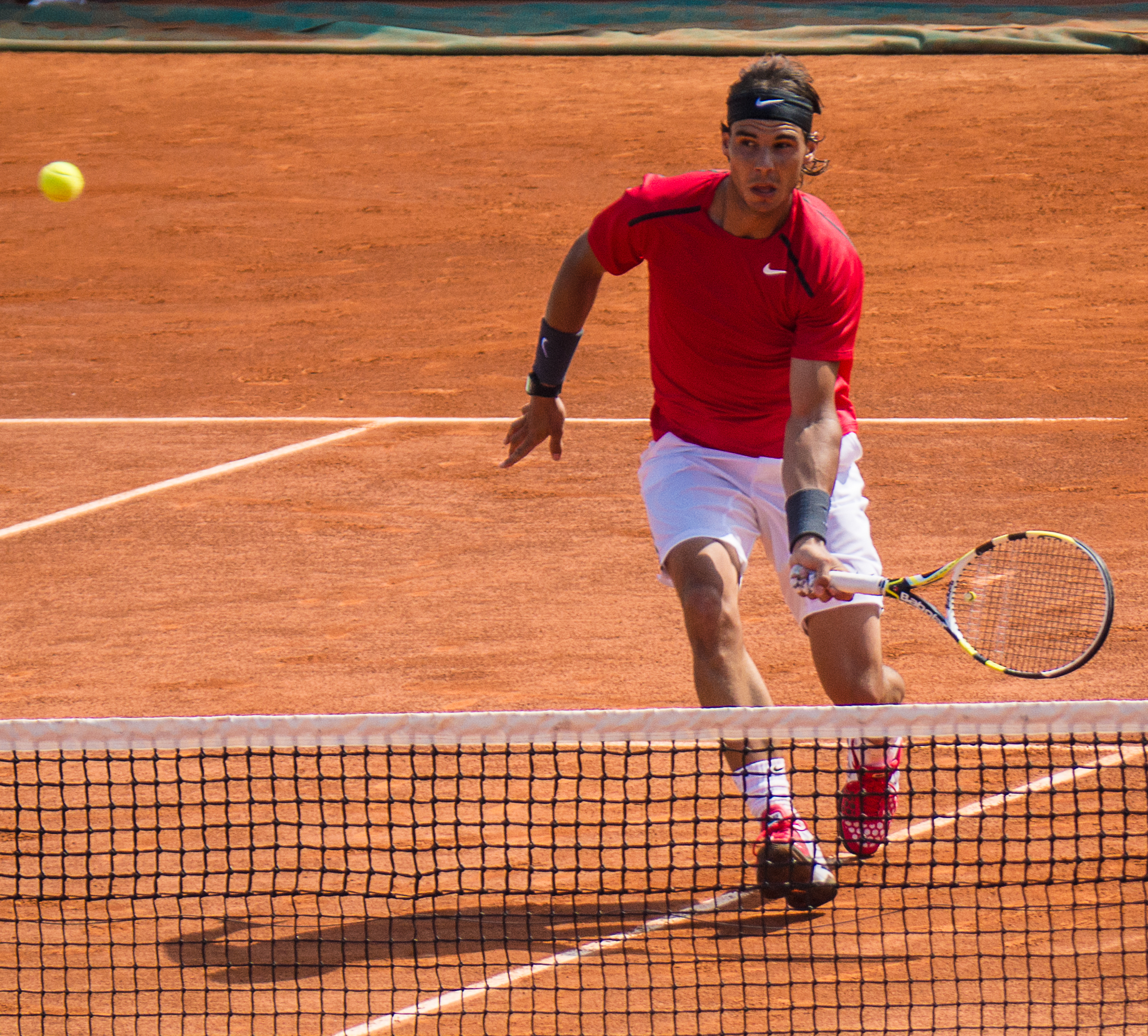 1er tour Roland Garros 2012 : Rafael Nadal (ESP) def. Simone Bolelli (ITA)